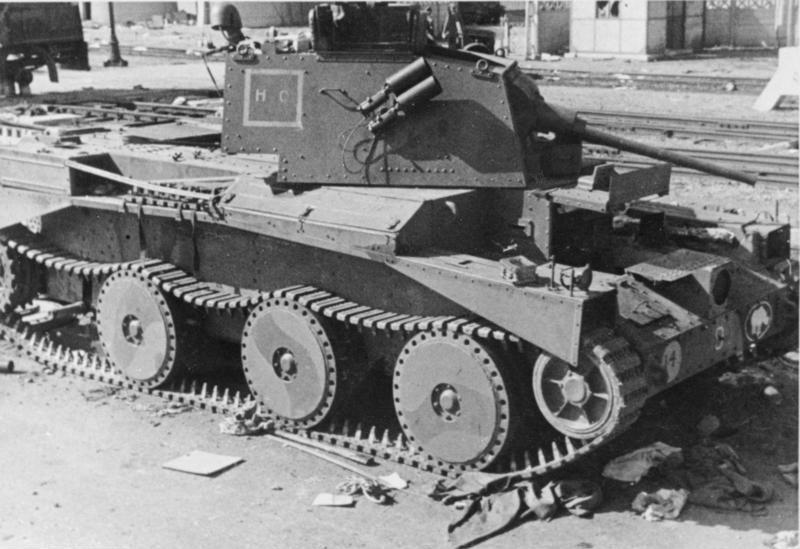 Calais, englischer Panzer. 31.5.1940, 16.30 Uhr